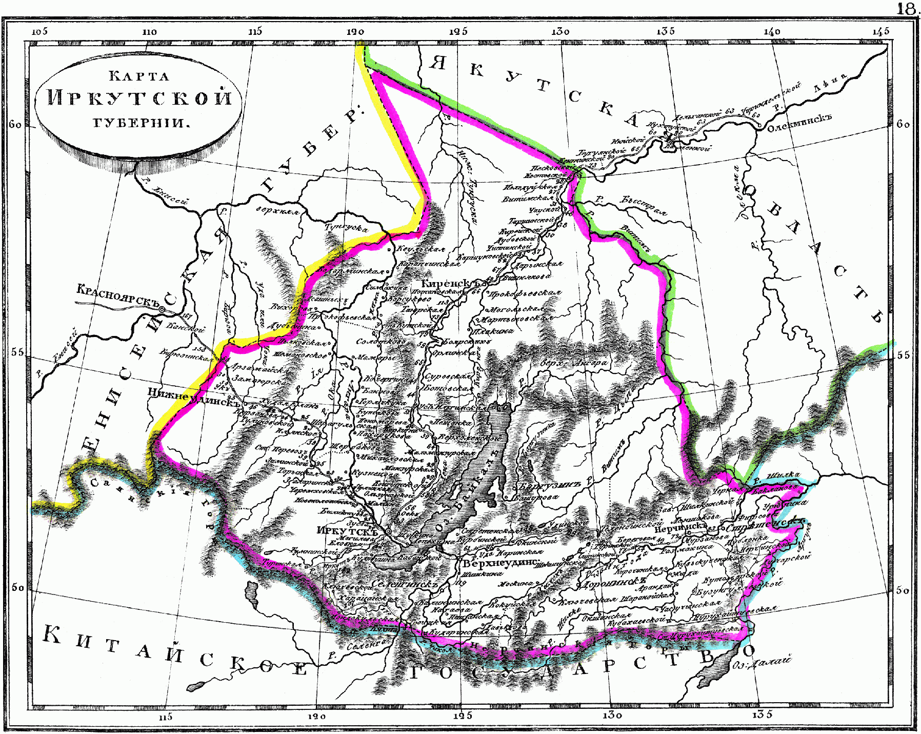 Карта Иркутской губернии, 1835